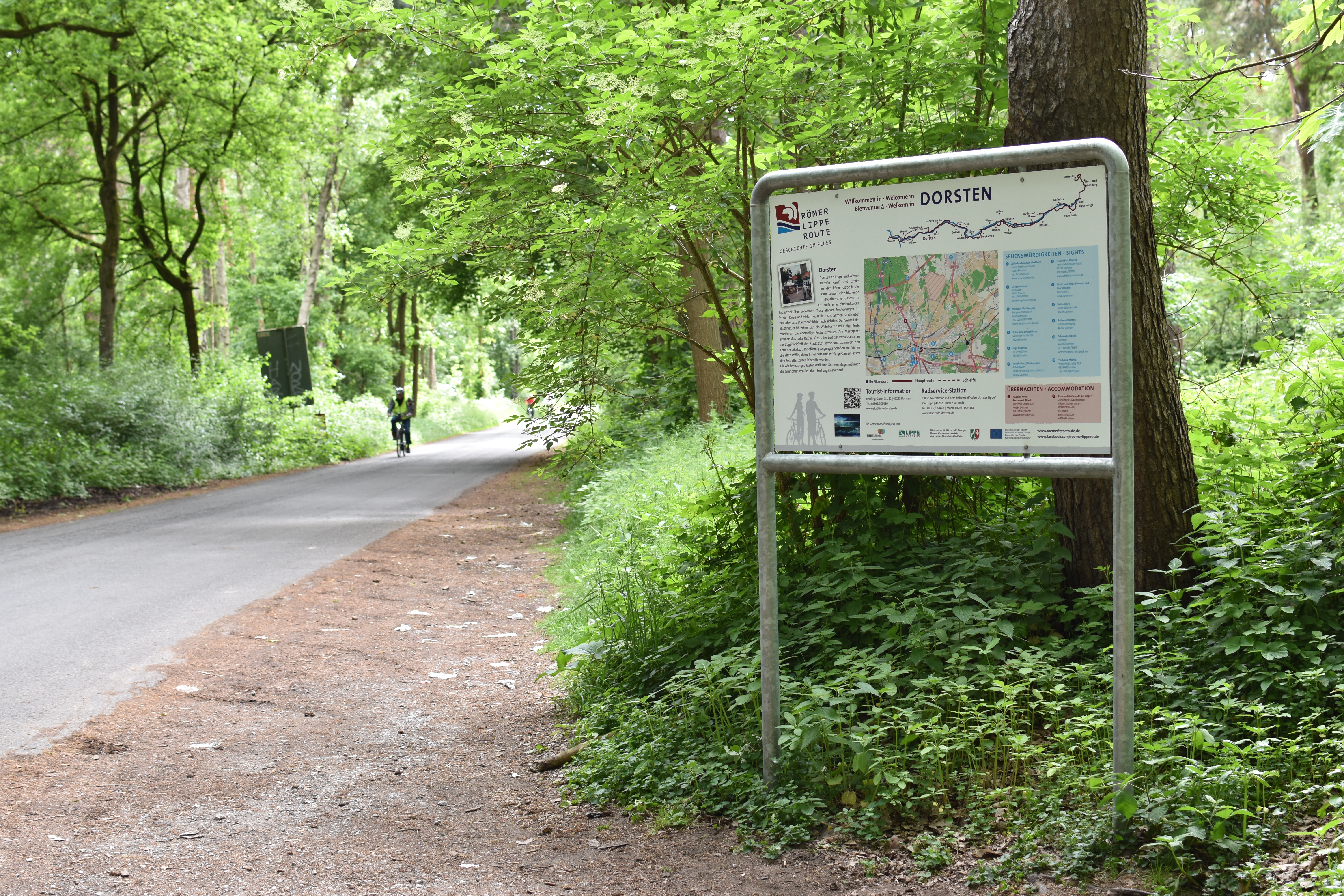 Infotafel nahe der Lippe für Reiseradler der Römer-Lippe-Route. Als Kartenmaterial wurde openstreetmap benutzt